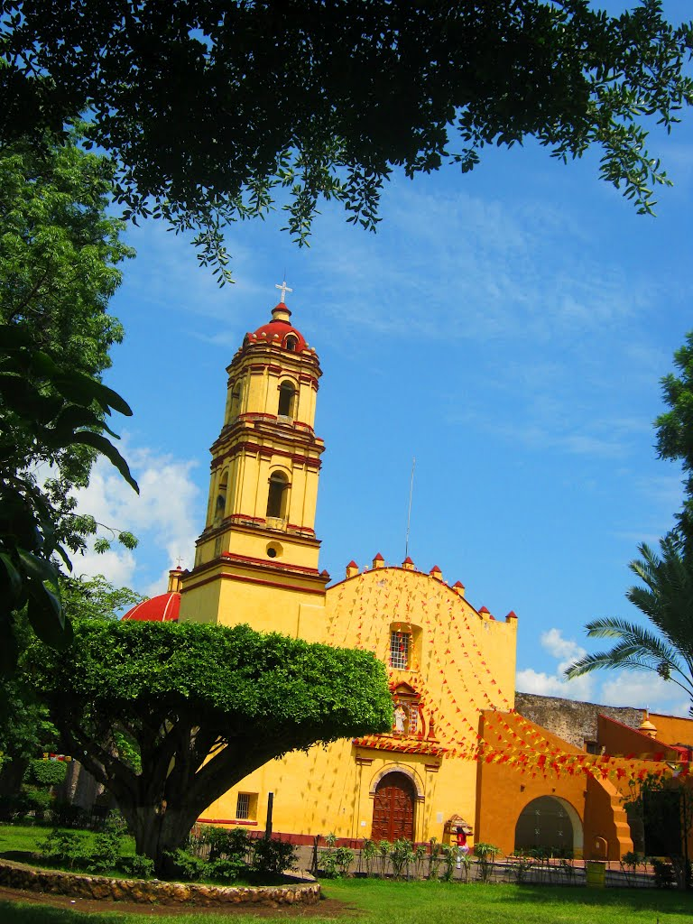 Ex-Convento Franciscano de Santiago Apostol - Jiutepec, Morelos.